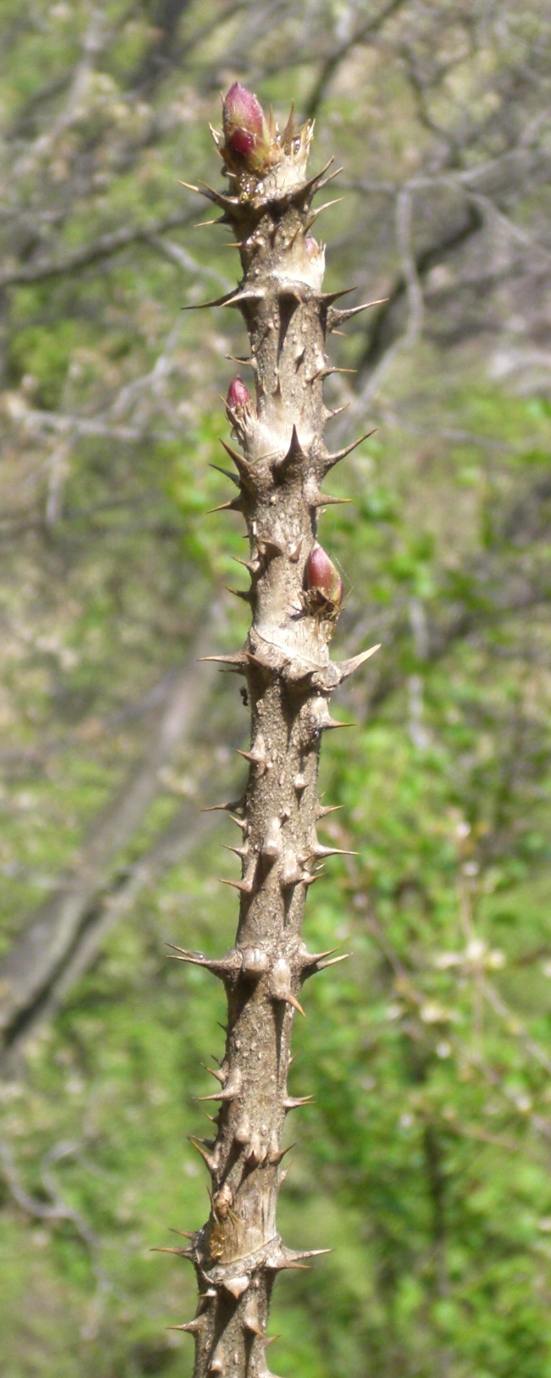 Aralia elata's bud; タラの芽